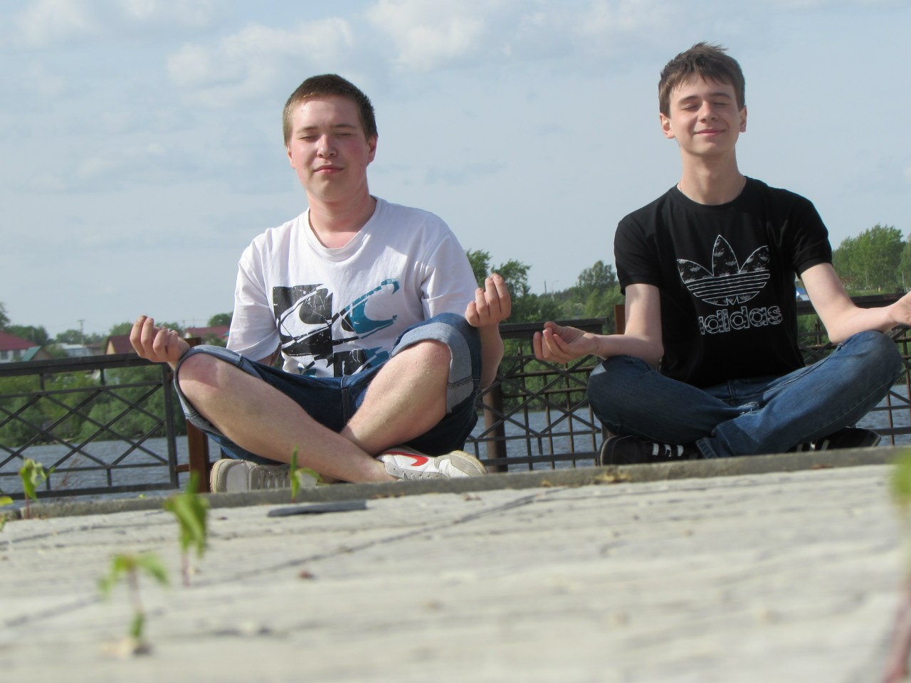 жизнь моя